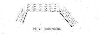 Aus: Legrand-Girarde et Plessix. Manuel complet de fortification. 4e édition. Paris (1909).